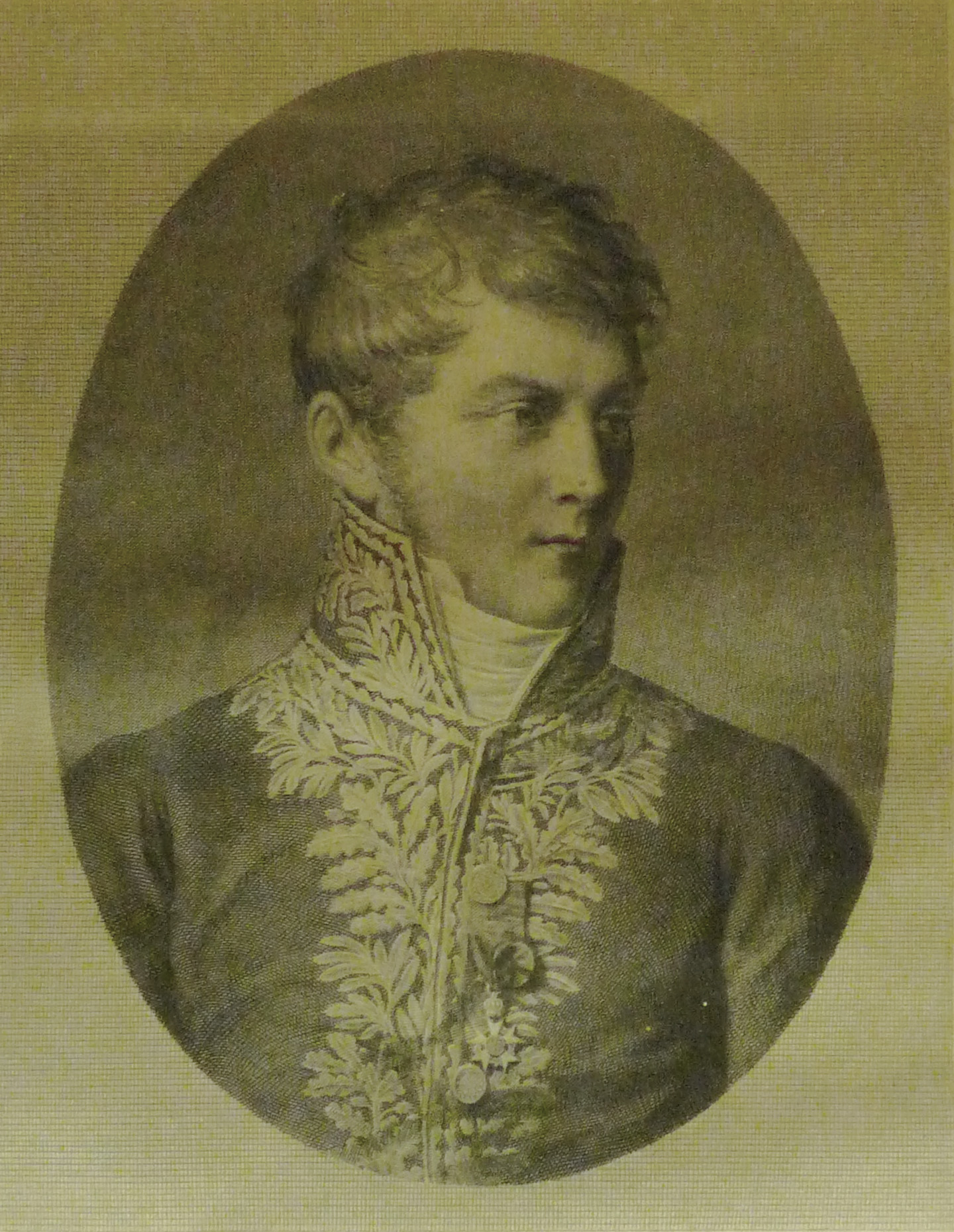 Portrait du préfet Adrien de Lezay-Marnésia, gravure de C. Guérin, vers 1820 (Musée Jean-Frédéric Oberlin, Waldersbach, Bas-Rhin)